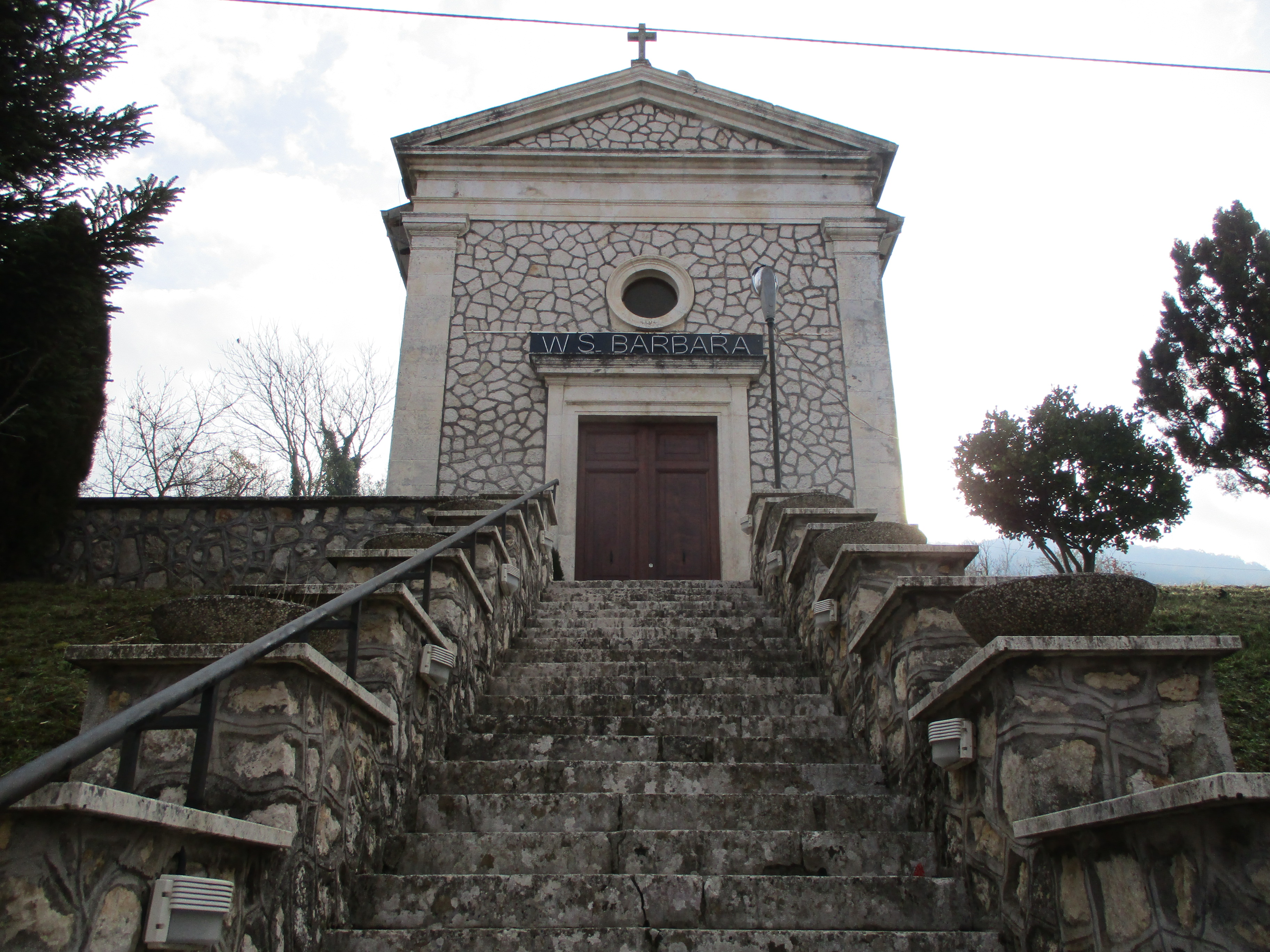 Chiesa di Santa Barbara